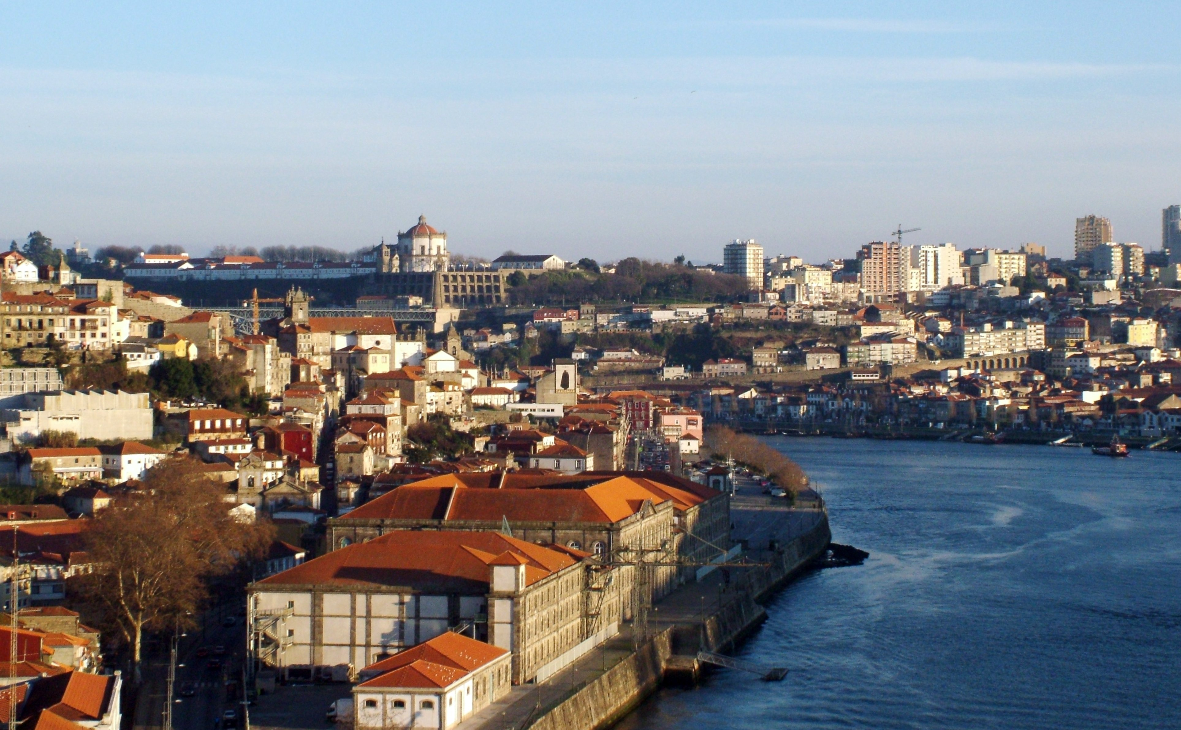 Douro e Alfandega, Porto /Oporto